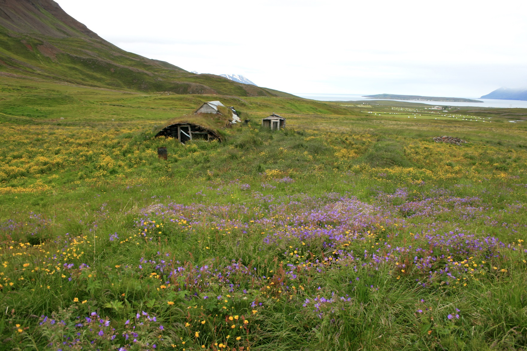 Kleif í Þorvaldsdal við Eyjafjörð